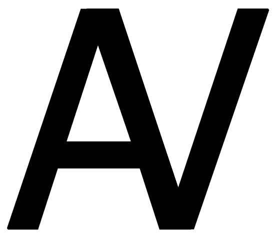 Emblema de la campaña presidencial de Jorge Alessandri en 1970, formado por las letras A y V (del lema de campaña "Alessandri volverá")